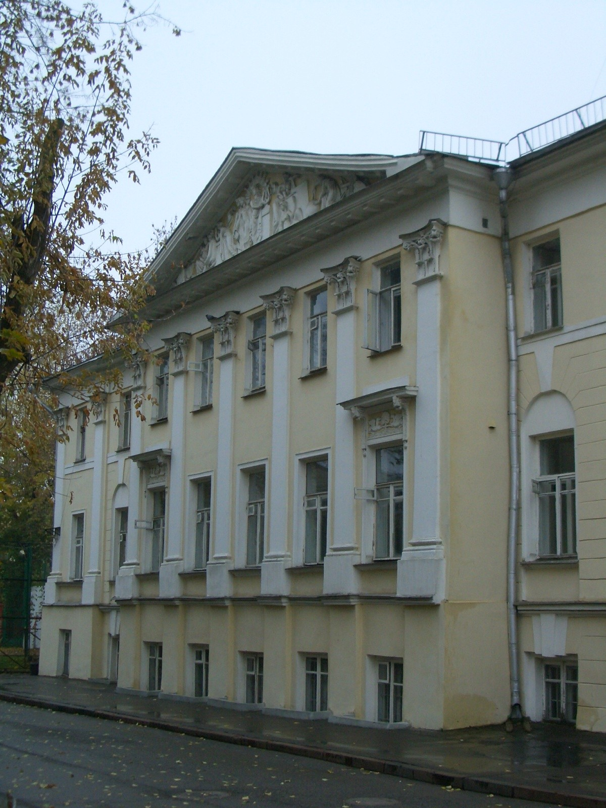 Beschreibung: Geburtshaus von Alexander Herzen in Moskau, heute Sitz des Gorki-Literaturinstituts, Adresse: Moskau, Tverskoj Boulevard 25, aufgenommen im Oktober 2006 Дом Герцена, Октябрь 2006 Autor: Lewa